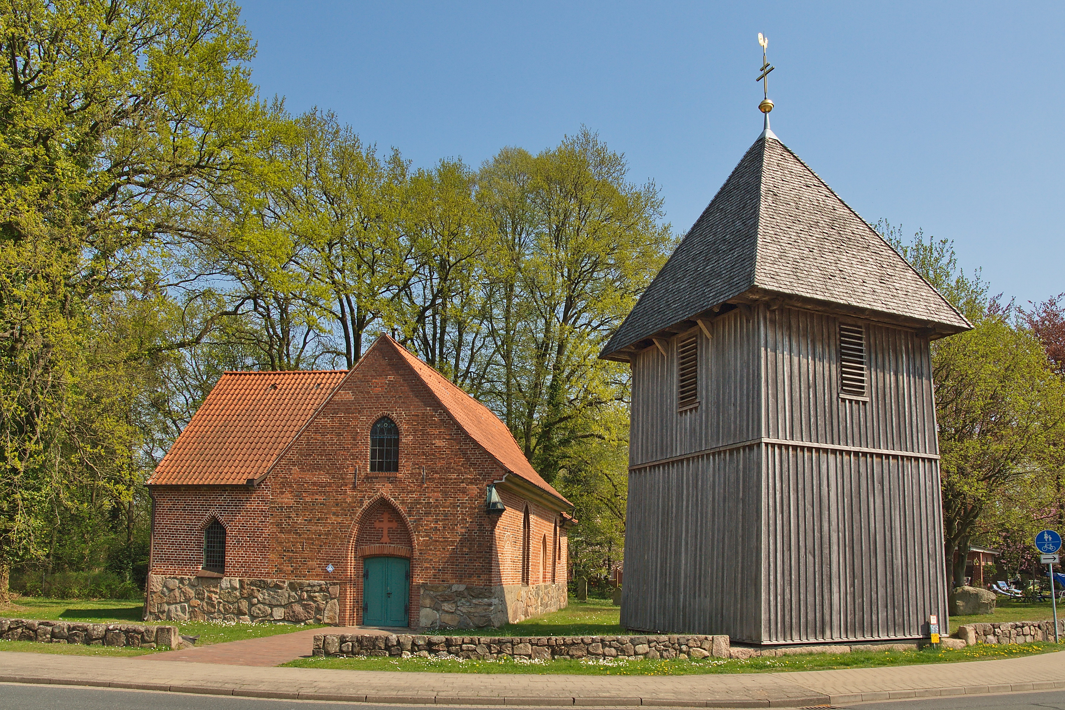 Heilig-Geist-Kirche in Wolterdingen (Soltau), Niedersachsen, Deutschland